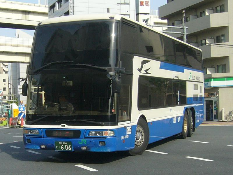 登録番号： 足立200か・606 ジェイアールバス関東(JR Bus Kanto)所属 car no.D654-02506 青春ドリーム号用 三菱ふそう・エアロキング MU612TX